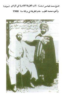 بولاية ورقلة بلدية الرويسات صور لشيخ الهاشمي مع شيخ الطريقة الاعلى بالجزائر وعموم افريقيا مع شيخ محمد الطيبوتلقي الاومر